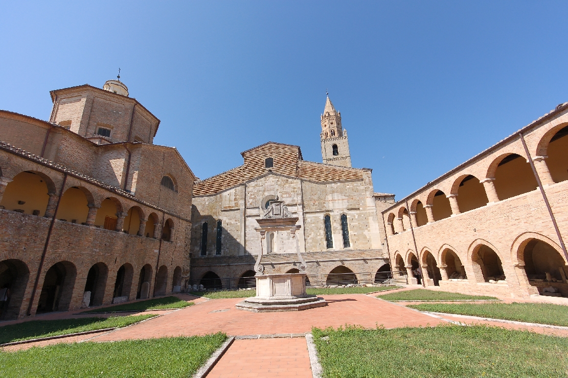 Atri 2011